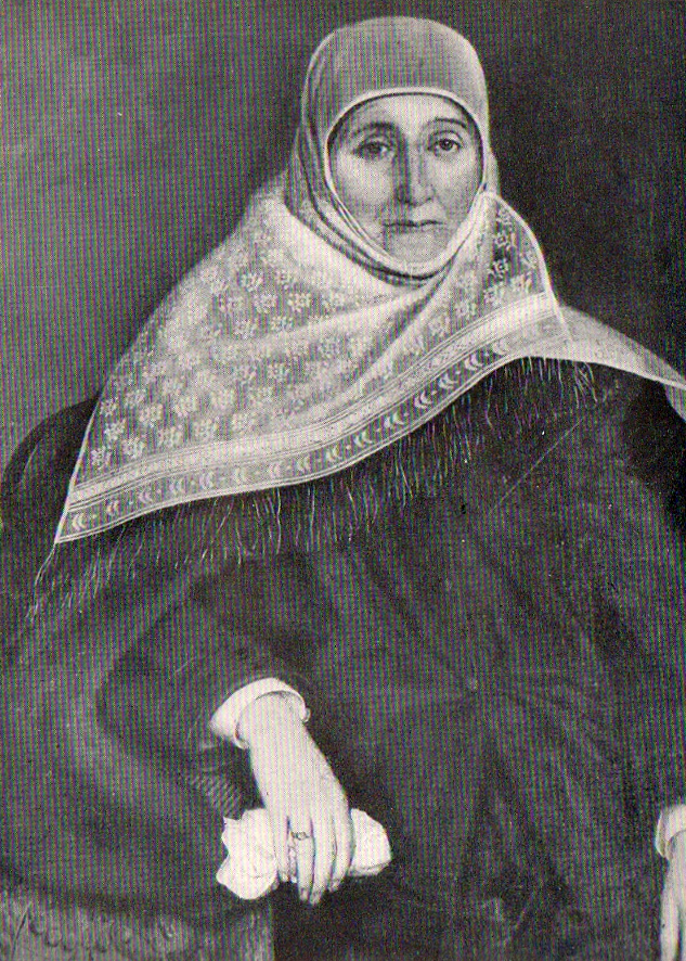 Portetul Voicăi Popeea, Muzeul de Artă din Brașov